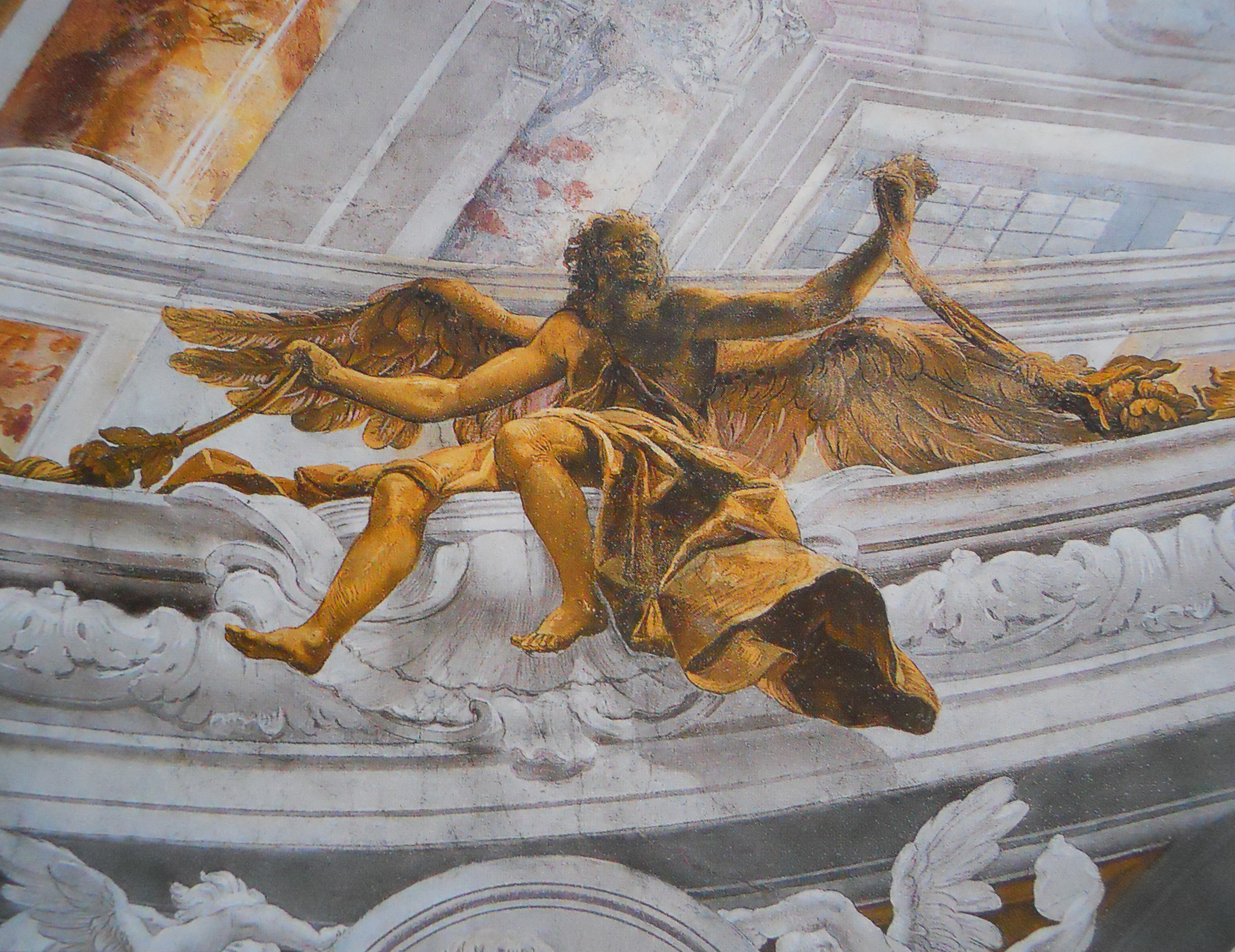 San Faustino maggiore (Brescia), gli affreschi di Girolamo Mingozzi